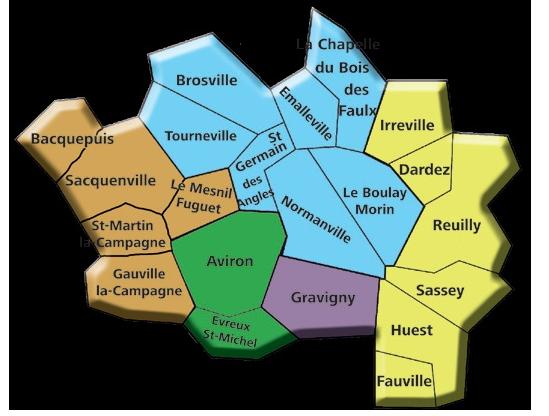 Territoire paroissial de saint jean baptiste du val iton